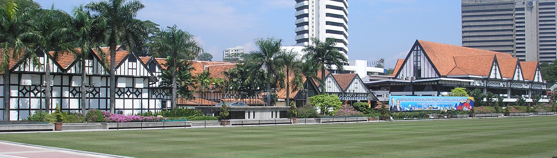 The Royal Selangor Club, Merdeka Square, Kuala Lumpur, Malaysia.